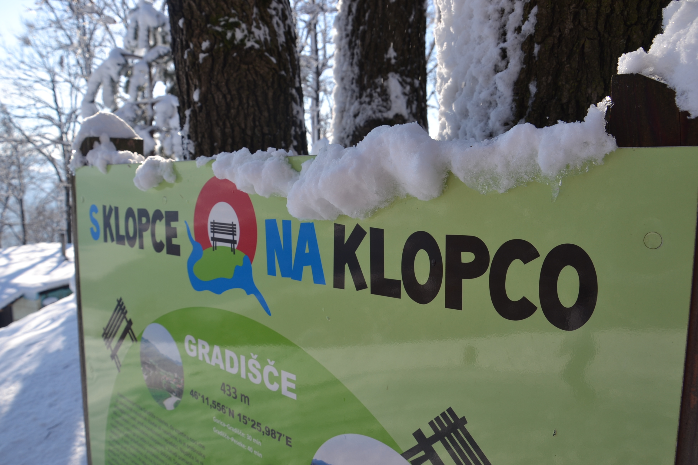 S klopce na klopco